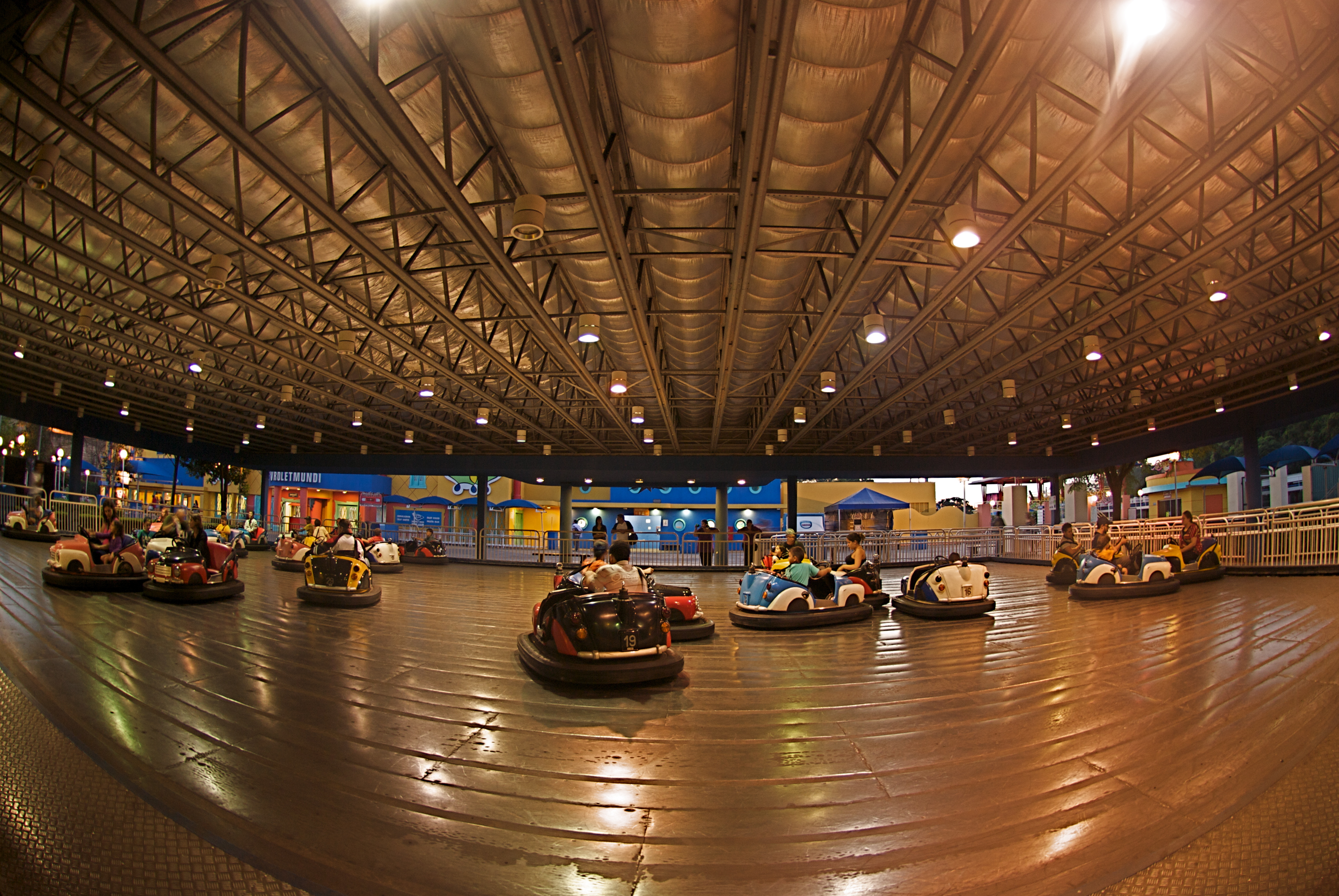 Auto-pixxxta